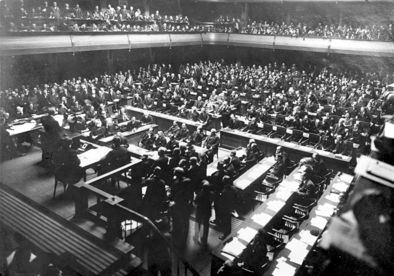 Die bedeutungsvolle Schlussitzung des Völkerbundrates in Genf. Blick in den Völkerbundsaal von der Rednertribüne aus während der bedeutungsvollen Schlussitzung. ("The significant closing session of the League of Nations in Geneva. View into the League of Nations from the speaker's rostrum during the meaningful closing session.")